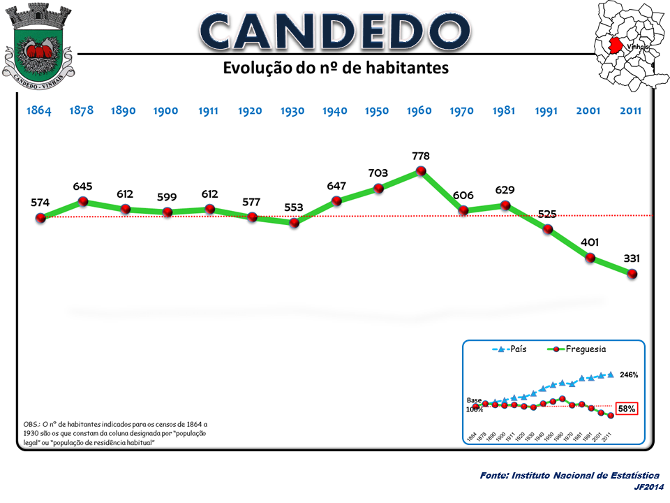 Evolução da População 1864 / 2011